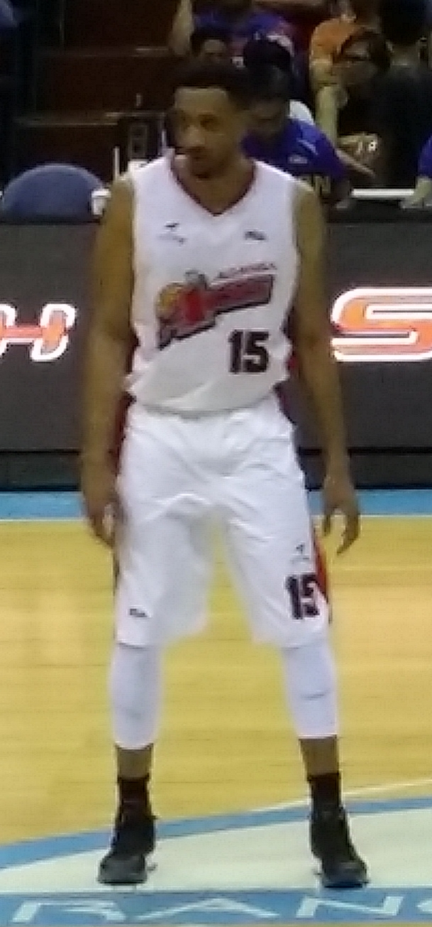 PBA - TNT vs Alaska - Shane Edwards-Alaska - 2016-0224